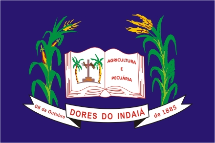 Bandeira do município de Dores do Indaiá, Minas Gerais, Brasil.